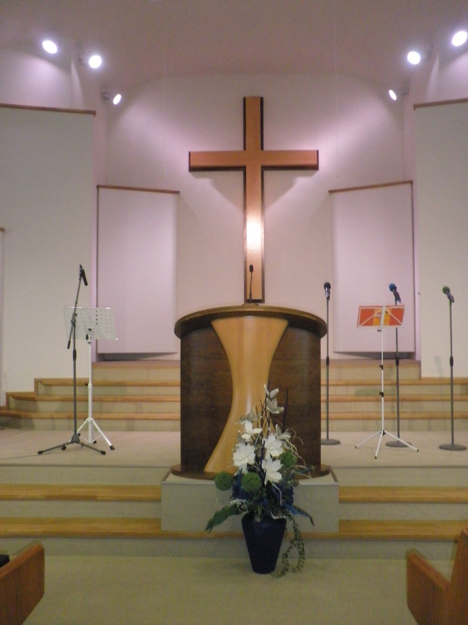 Interiér modlitebny Bratrské jednoty baptistů v Aši